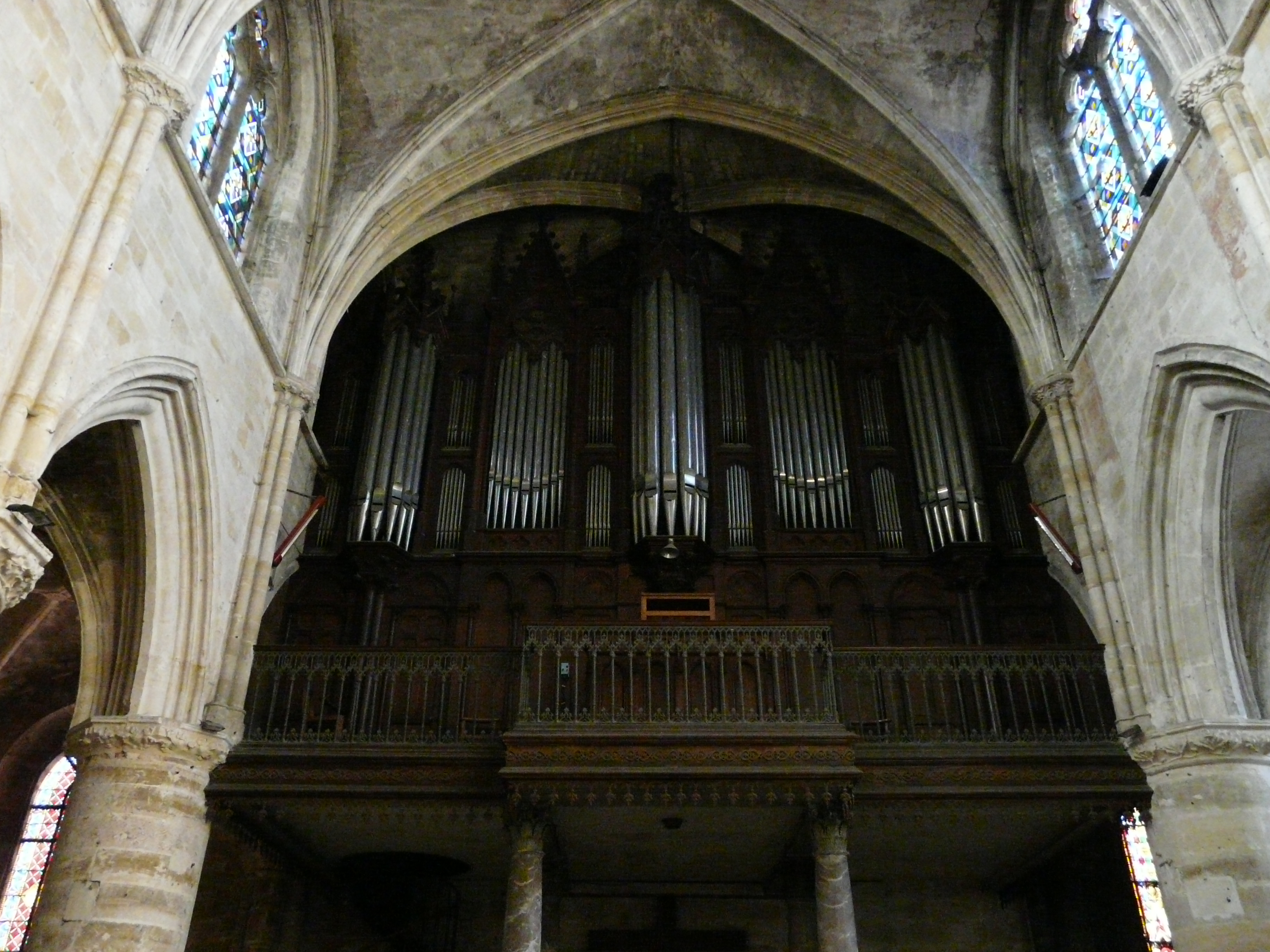 Eglise Notre Dame de Bar-le-Duc : le buffet d'orgue